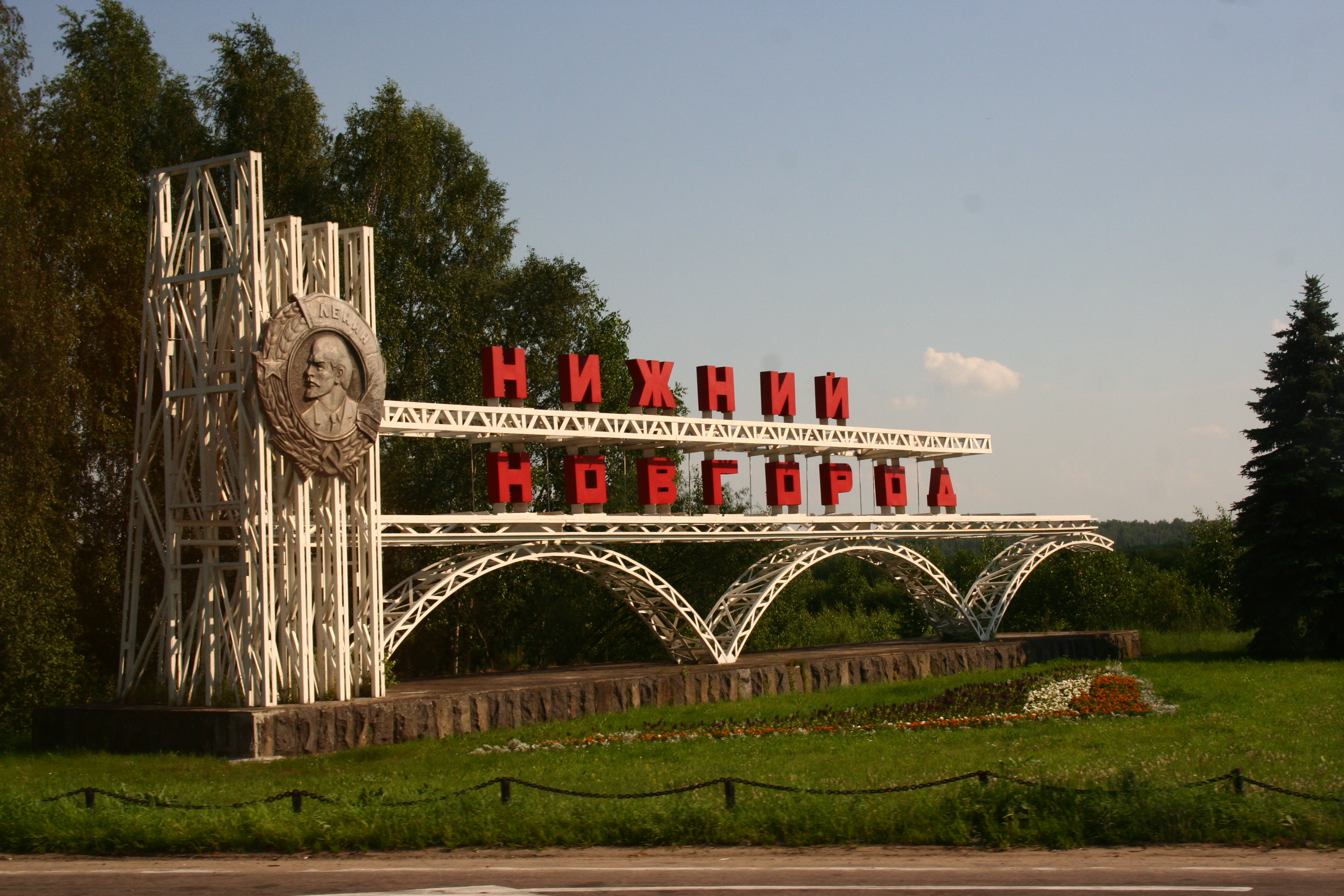 Указатель при въезде на территорию города Нижний Новгород, Федеральная автомобильная дорога М7 «Волга» (Горьковское шоссе).